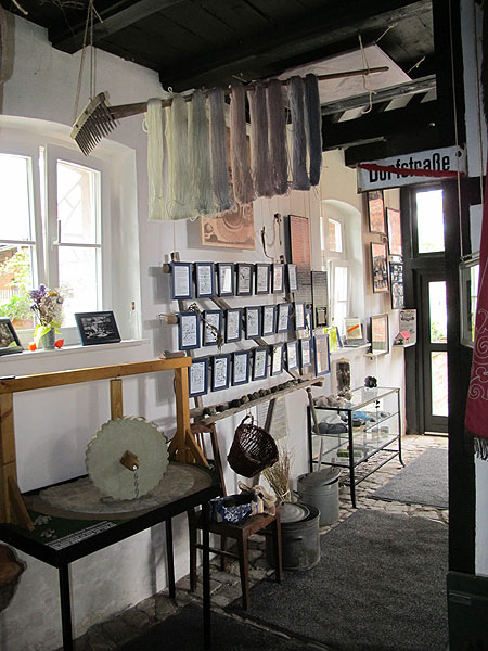 Heimat- und Waidmuseum in Hochstedt - Detail der Waid-Ausstellung: Modell einer Waidmühle